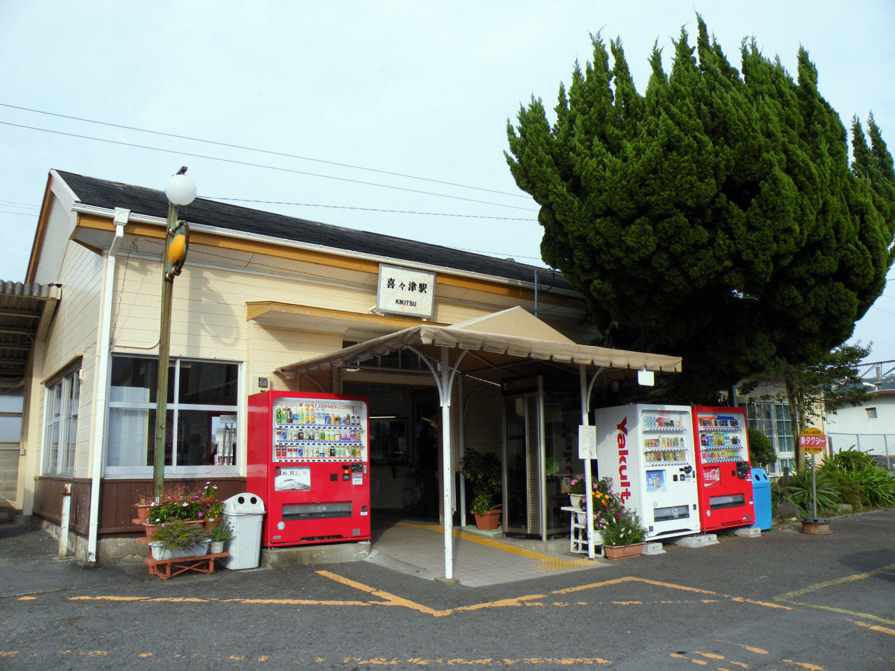 JR九州長崎本線喜々津駅